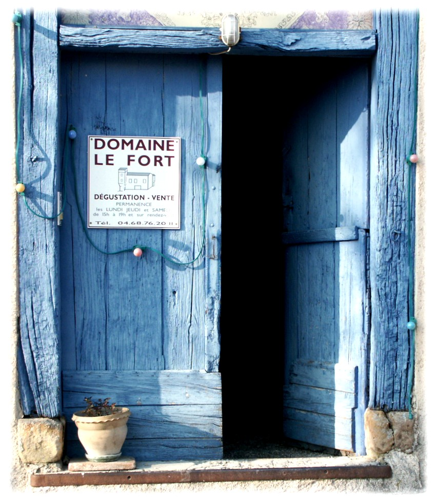 Caveau de dégustaion du domaine Le Fort à Montreal-de-l'Aude